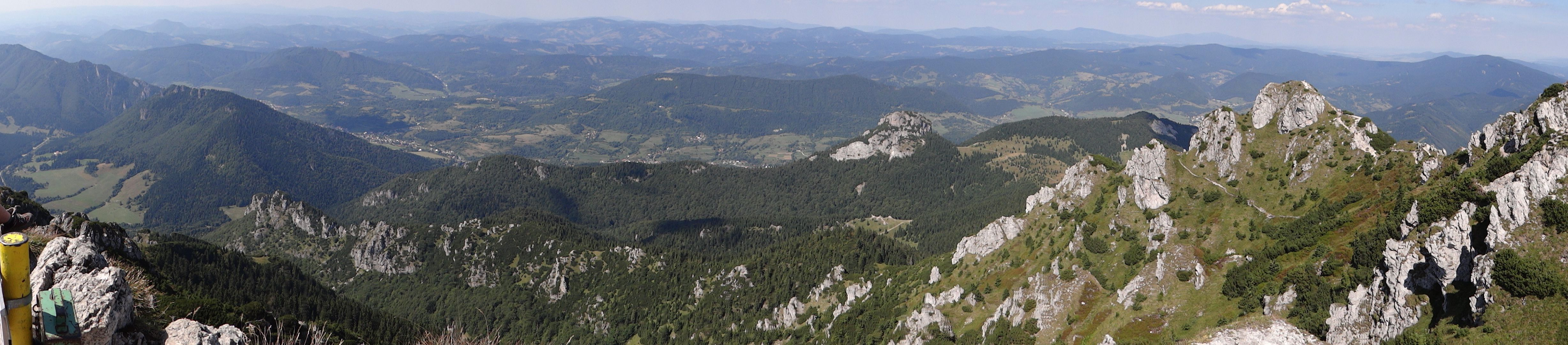 Veľký Rozsutec panorama